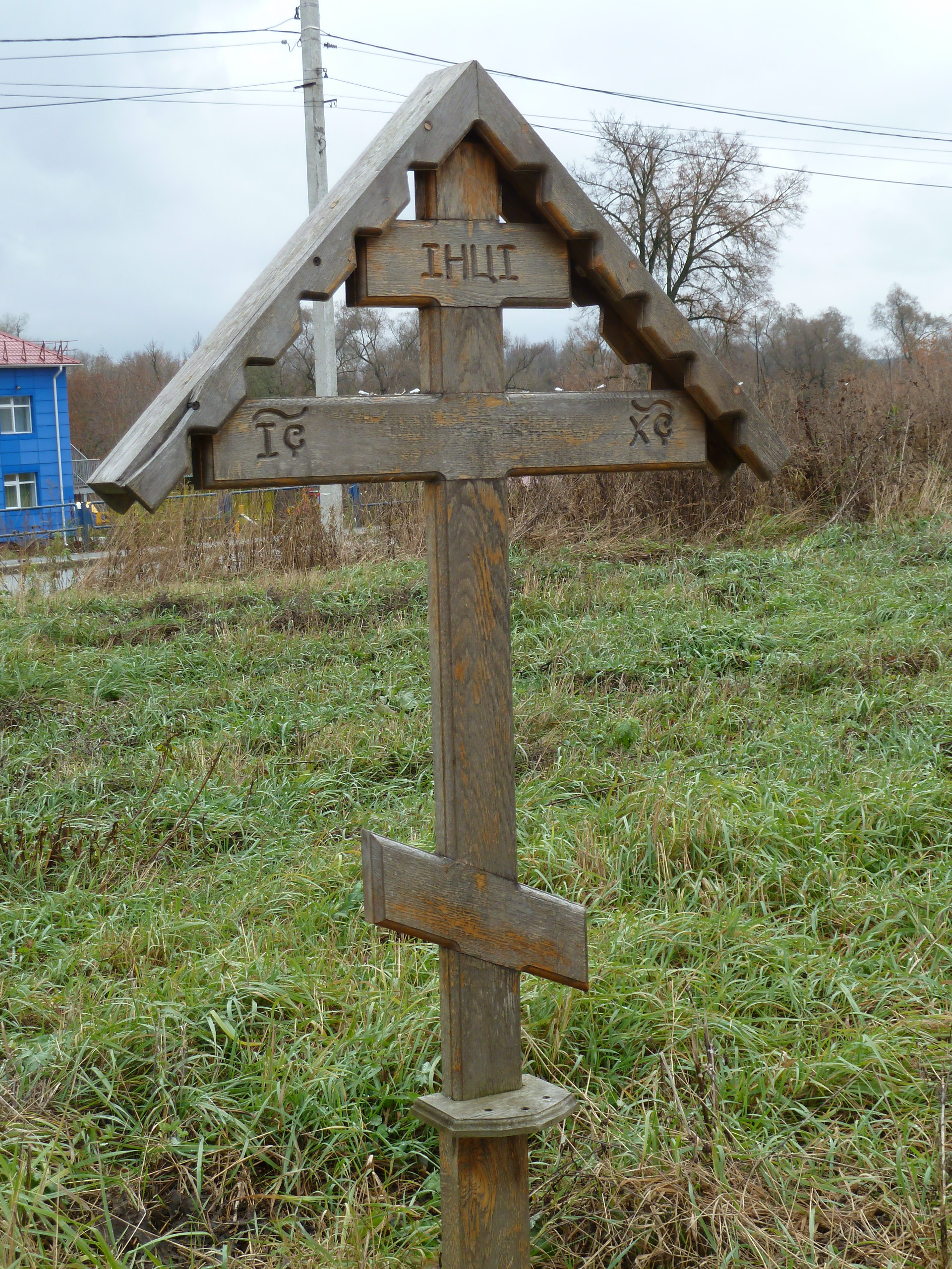 Поклонный крест на территории бывшего старообрядческого кладбища (мк-рн "Новая Ботаника", [2017])